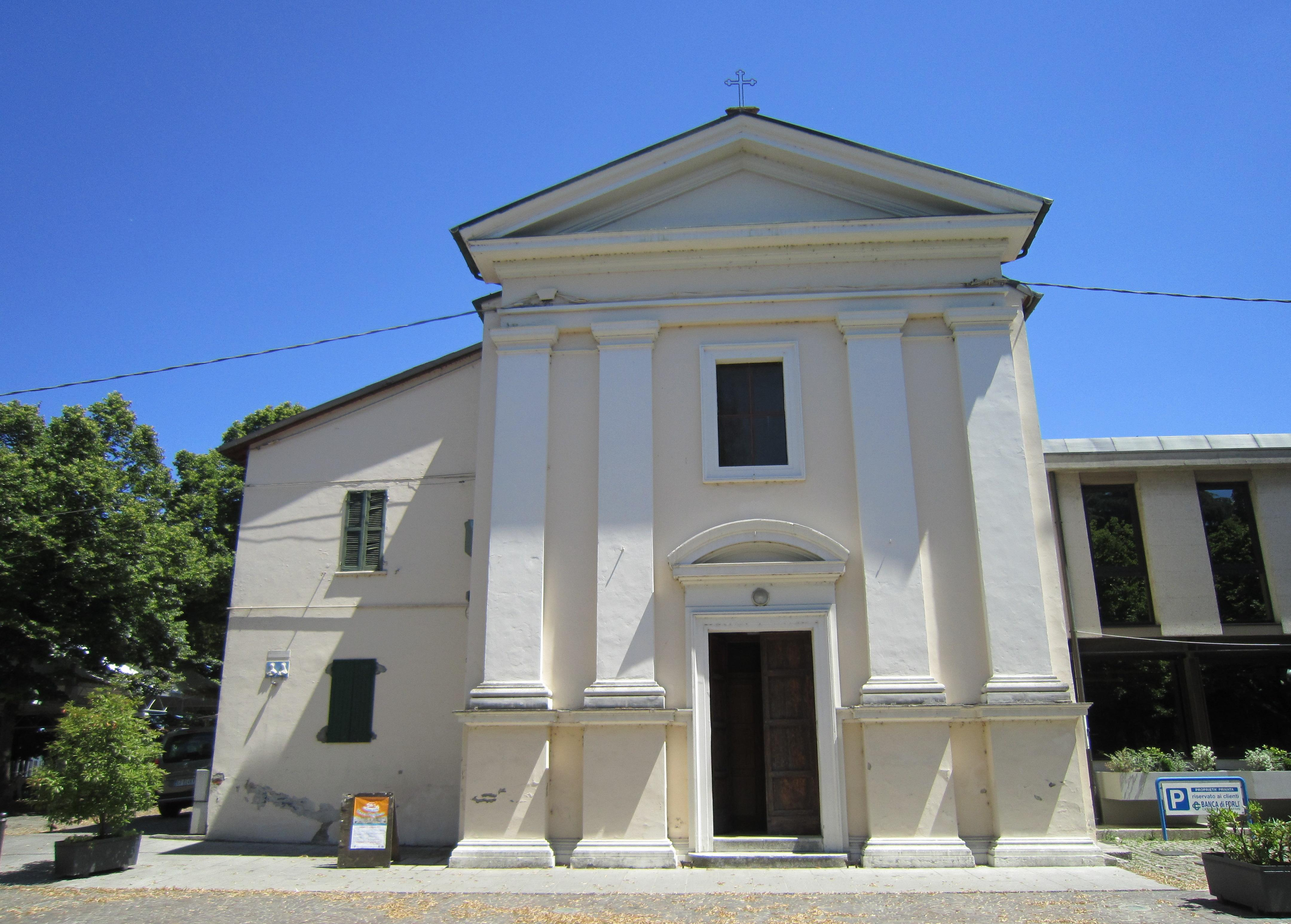 Chiesa di San Martino in Strada (Forlì), foto propria